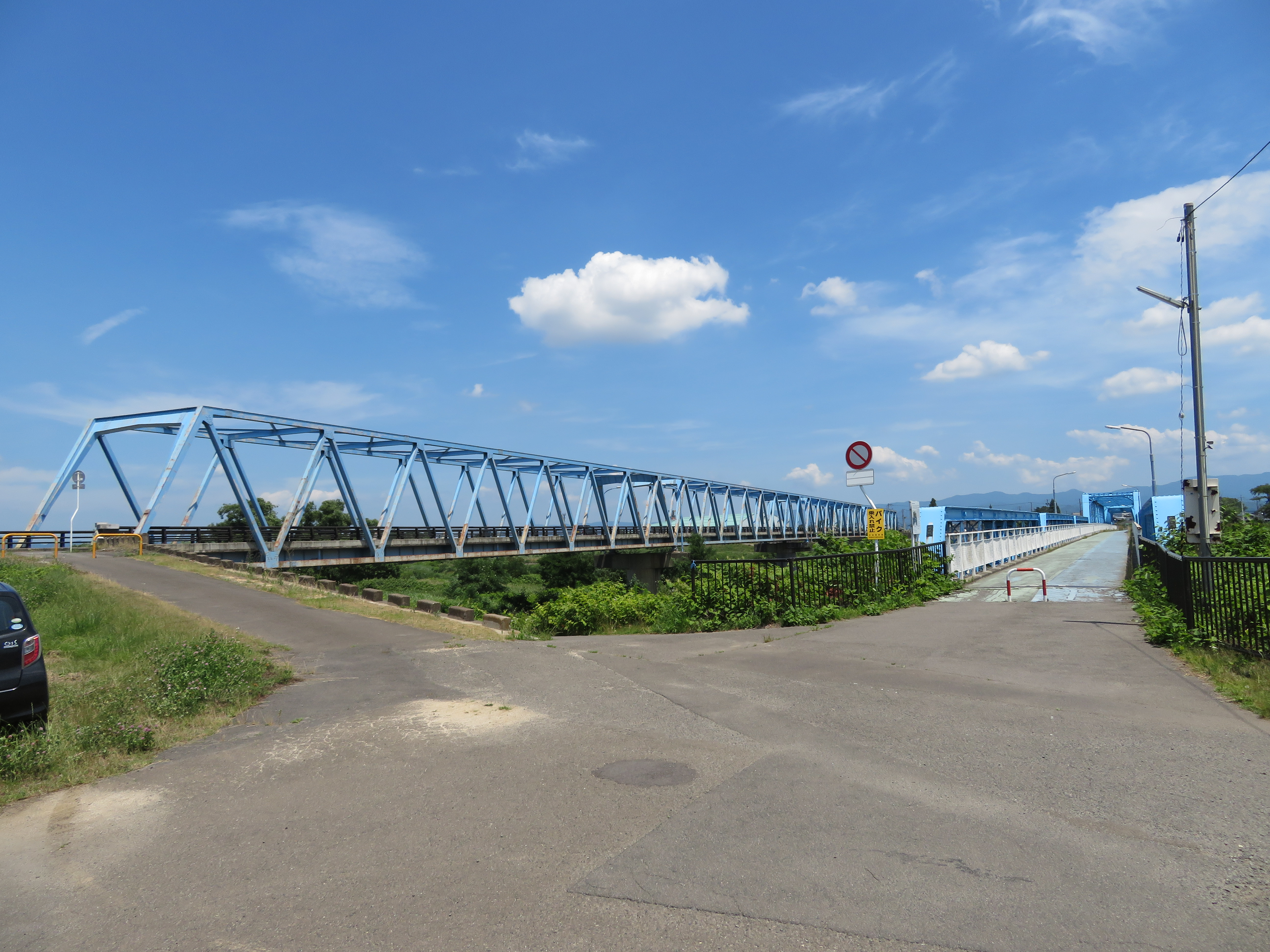 阿武隈川に架かる伊達橋（写真左側が車道橋、右側が歩道橋） Canon PowerShot SX720 HS